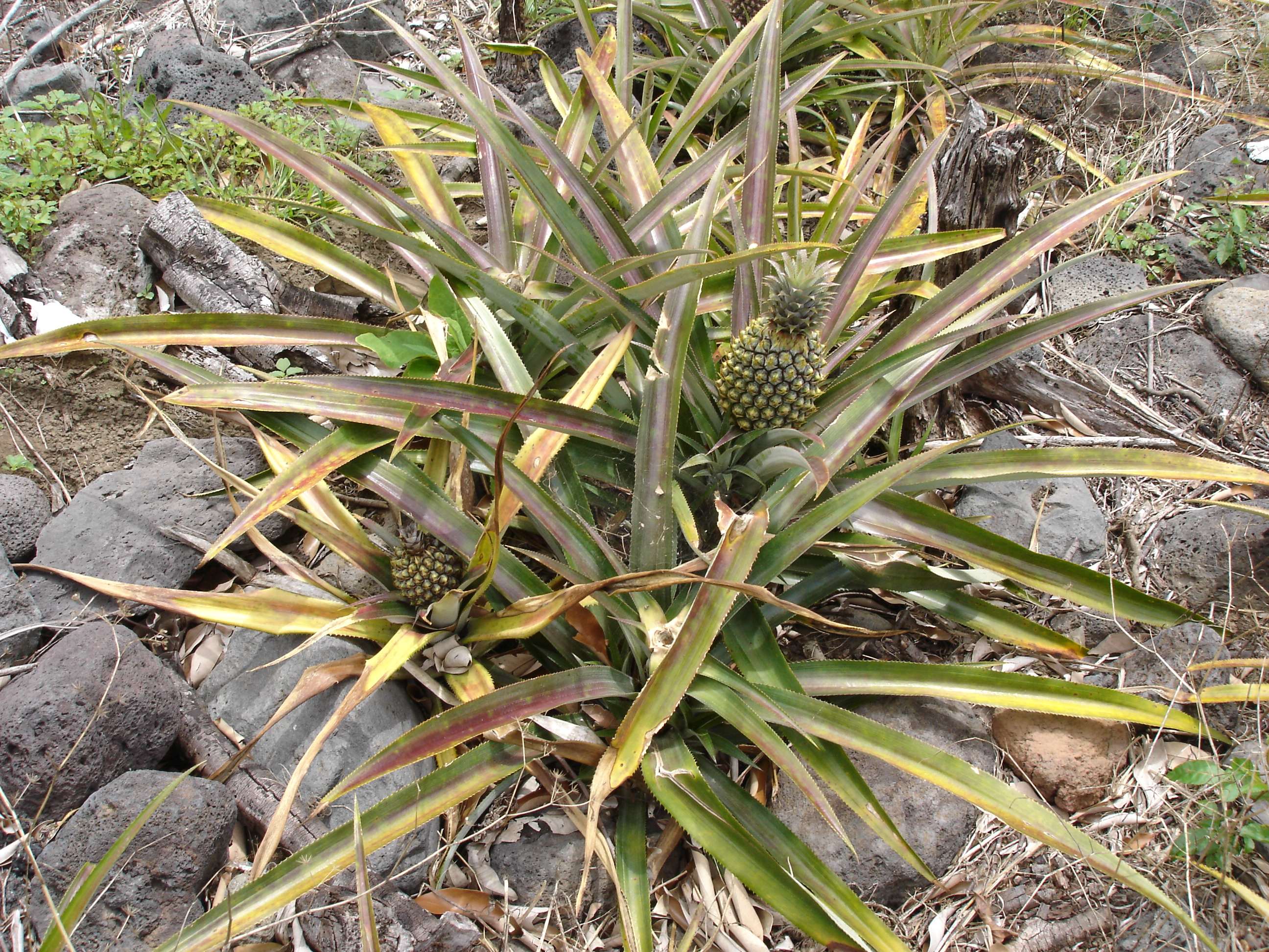 Description: Ananas Victoria dans la vallée de la rivière Langevin, novembre 2004, La Réunion Source: Bouba